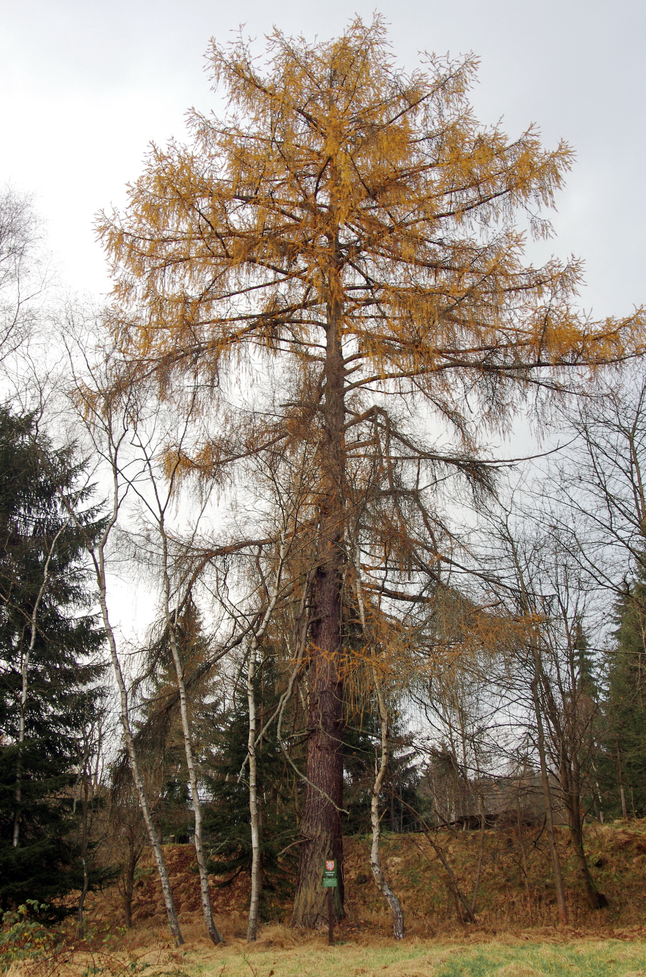 památný strom - Modřín u Stříbrného potoka - Stříbrná, okres Sokolov